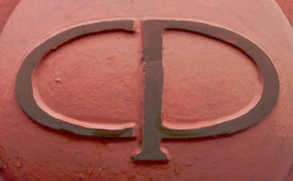 Logo da CP anterior ao atual